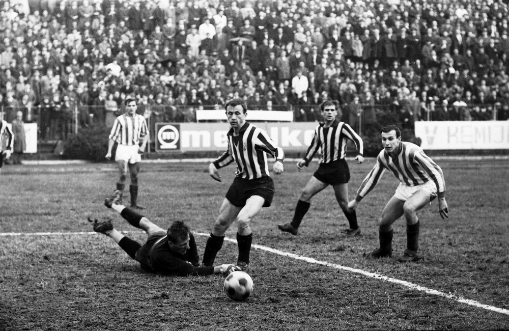 Olimpija proti Crveni zvezdi na napolnjenem bežigrajskem stadionu.